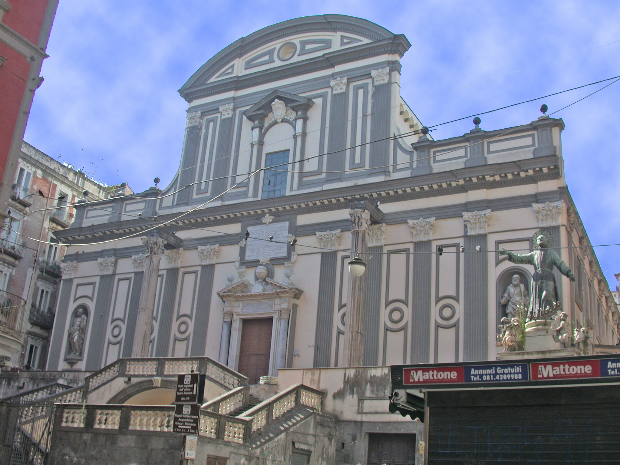 Italia, regione Campania, Napoli, chiesa di San Paolo Maggiore, facciata.